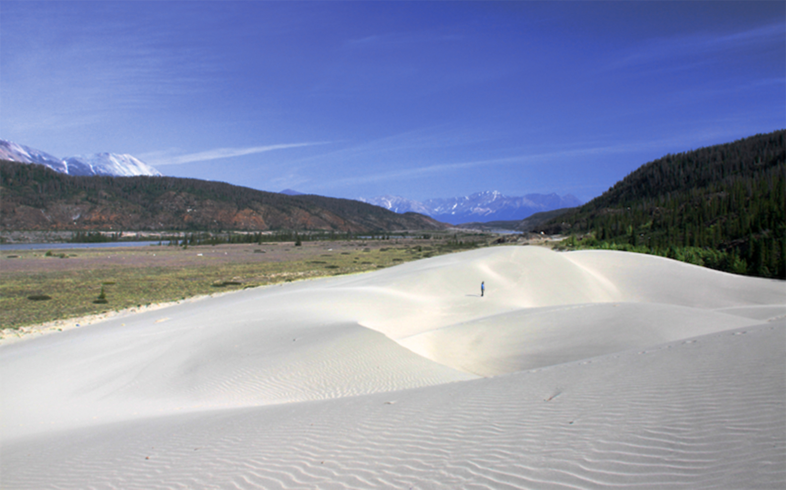 Am Oberlauf des Alsek River: Sanddünen statt Schnee, Wüste statt Eis.